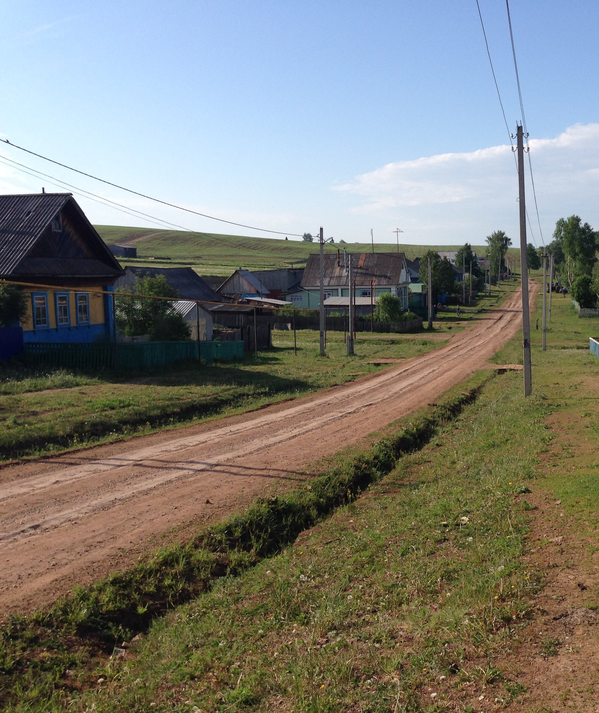 Центральная улица